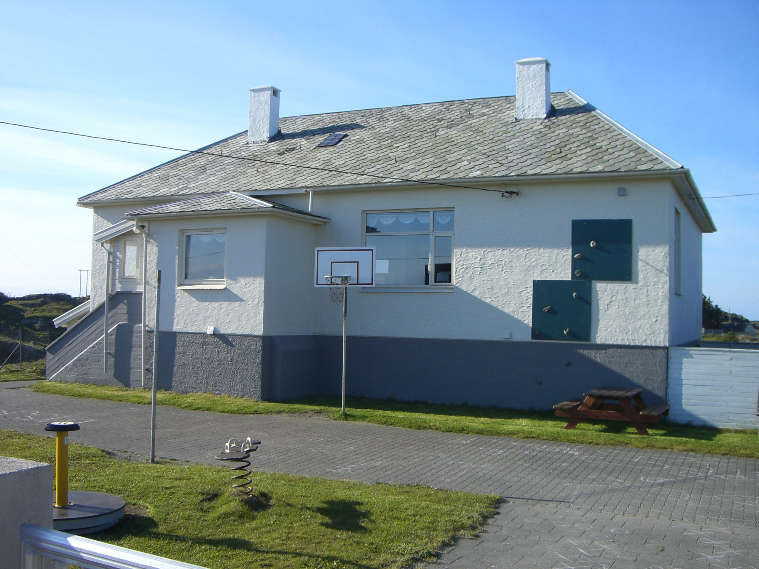 Feøy skole i Karmøy kommune, Rogaland, Norge.